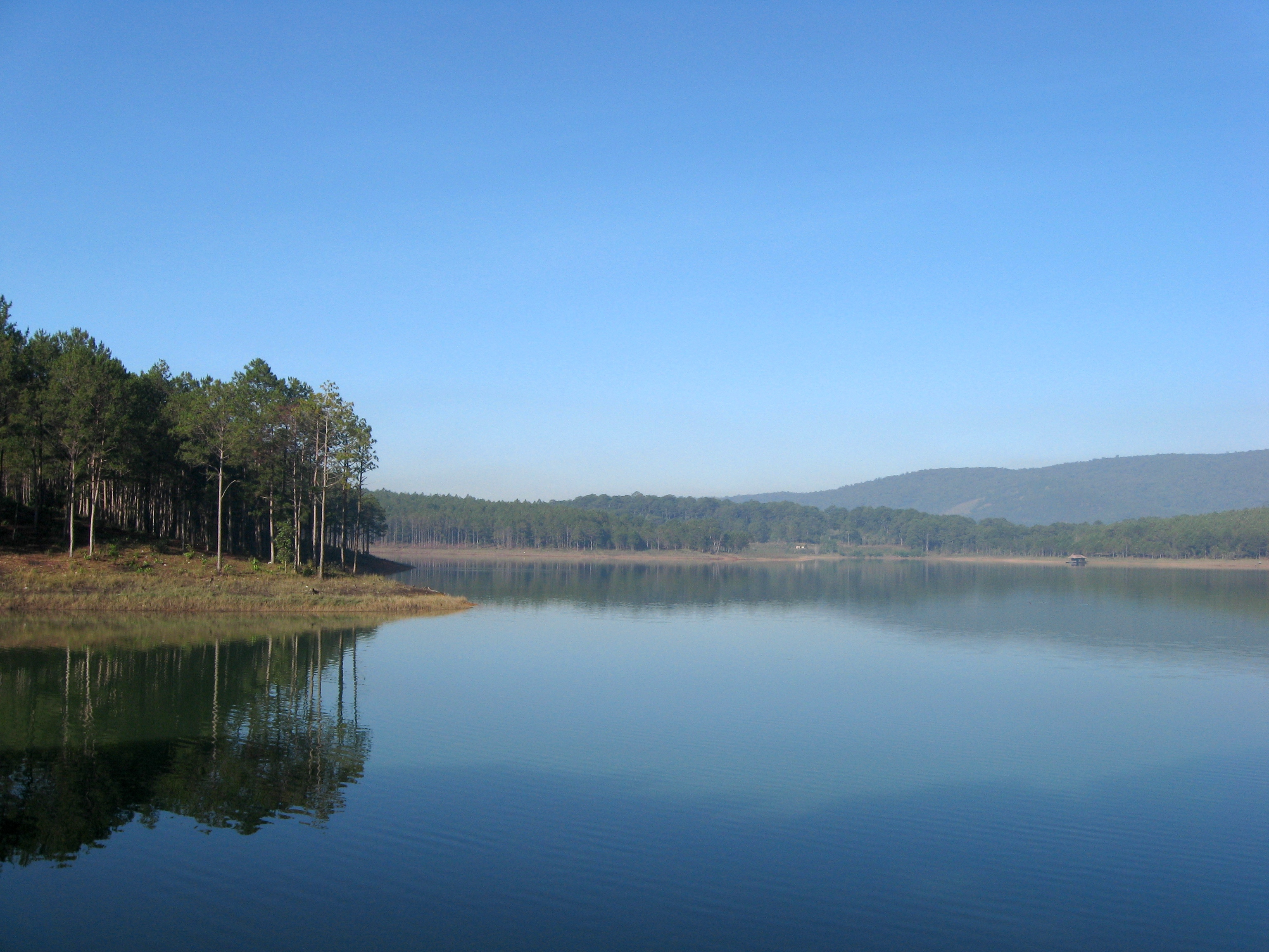 Tuyen Lam Lake, Da Lat